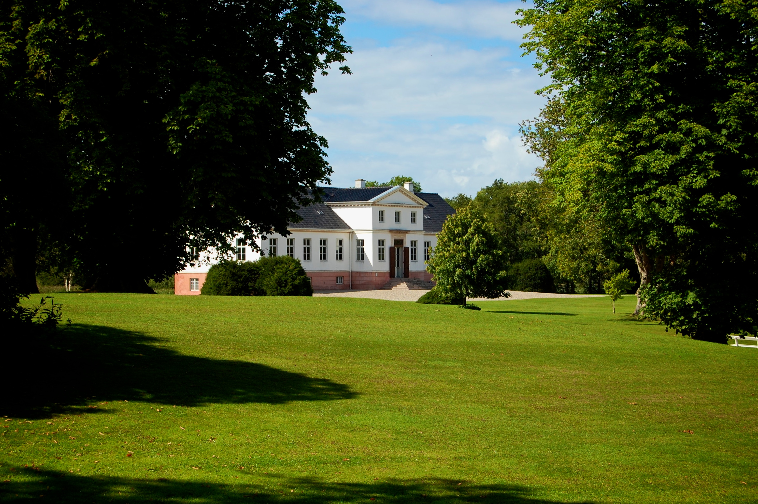 Pederstrup